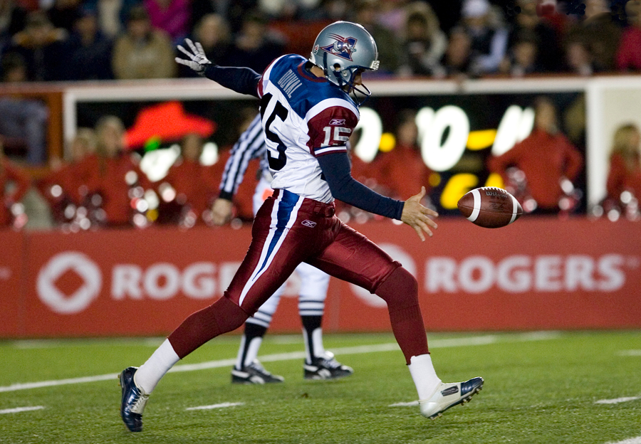 Damon Duval punting.